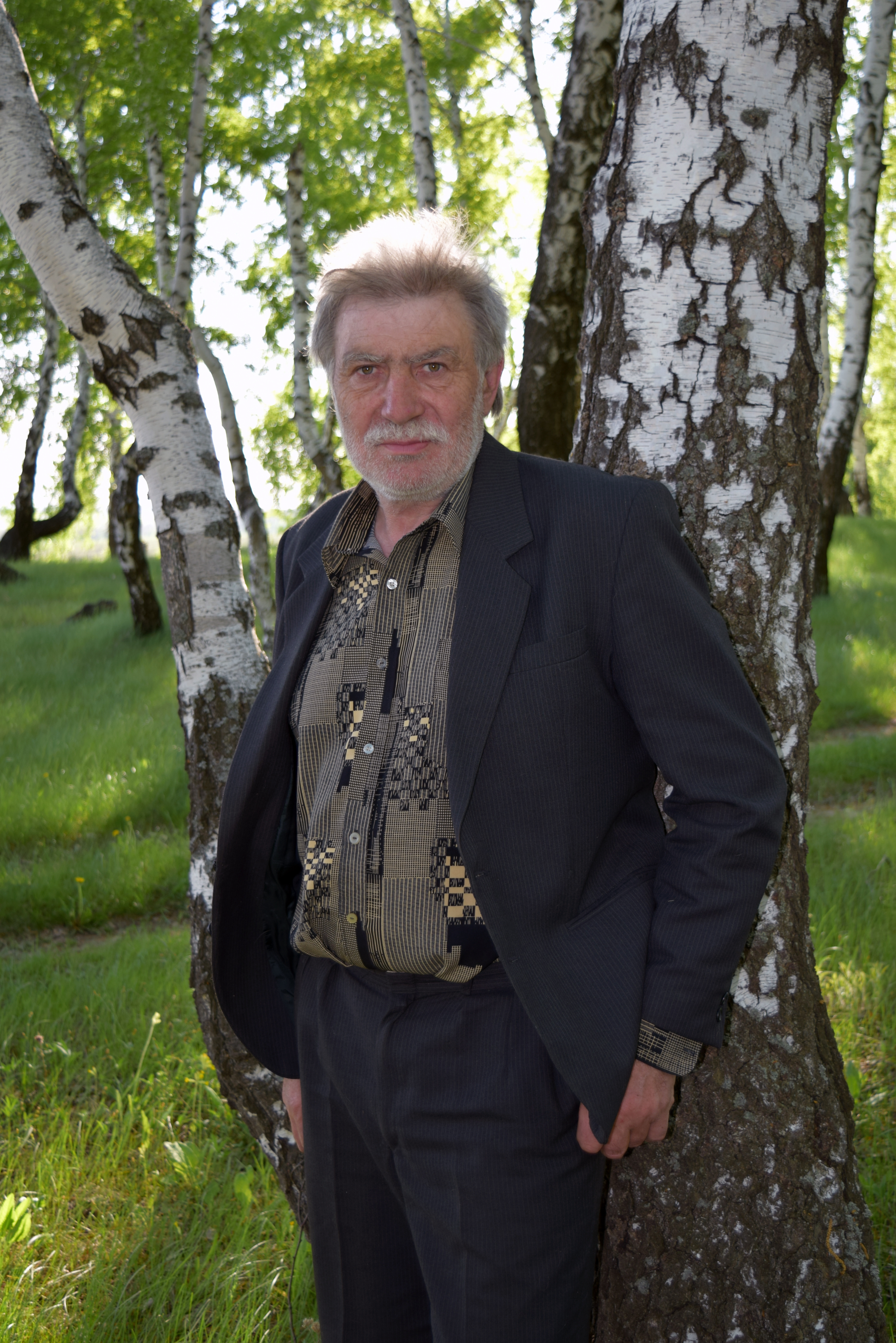 Олег Алексеевич Каштанов - калининградский и рязанский литератор, член Союза российских писателей и Союза свободных писателей, педагог-новатор, краевед, художник, строитель олимпийских объектов Москвы, рериховед.